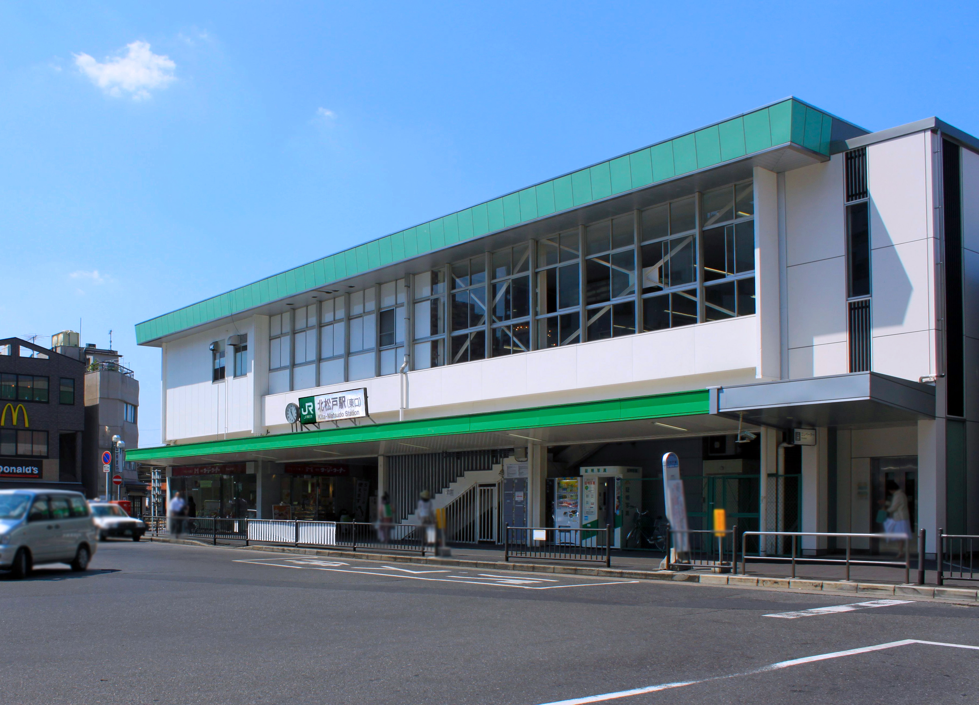 北松戸駅（拡大、色彩変更）